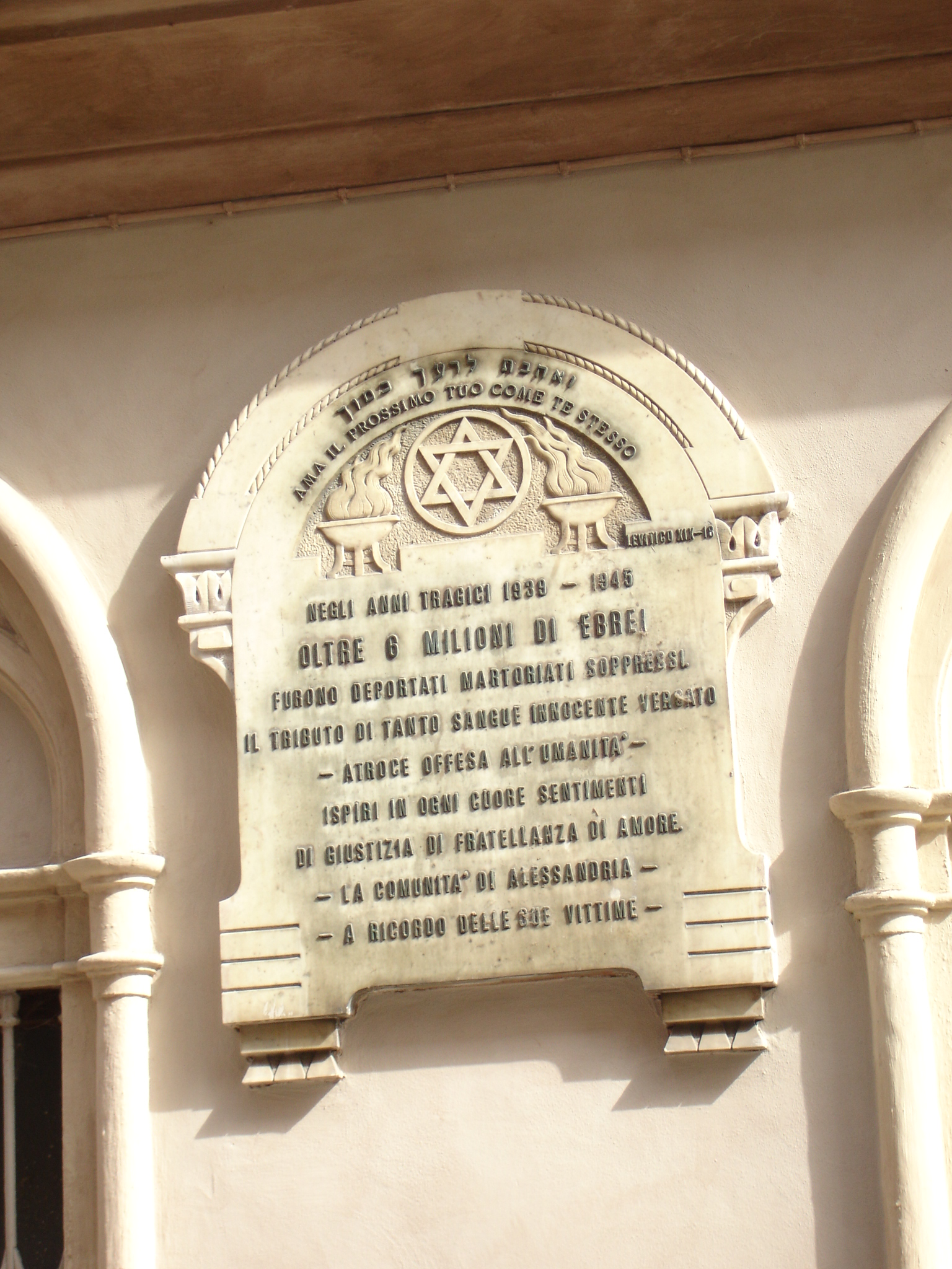 Sinagoga di Alessandria (via Milano, angolo Piazzetta della Lega), targa agli ebrei morti nella Shoah